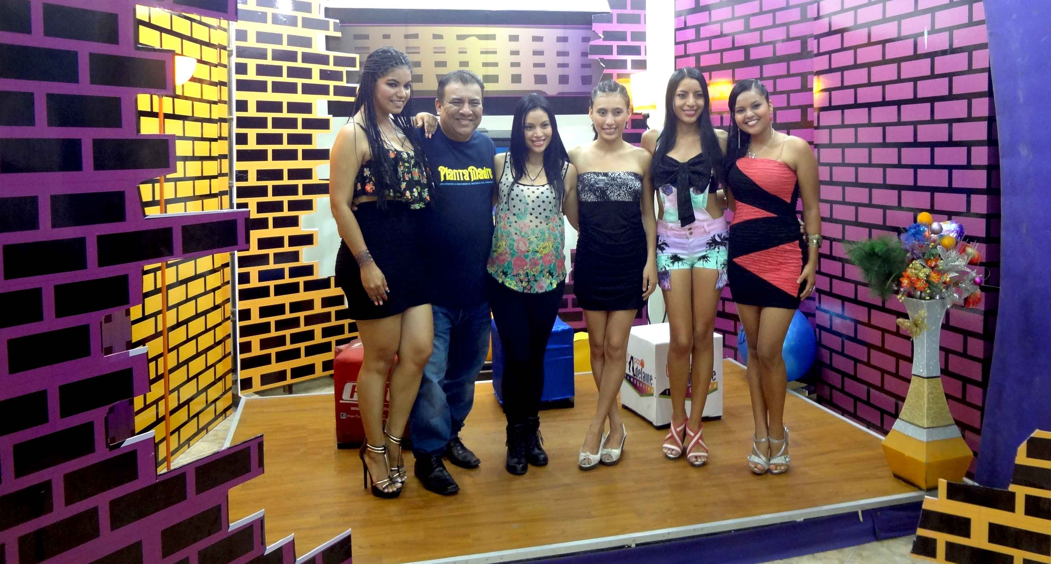 Set de televisión de Un paso adelante, programa de television en Iquitos